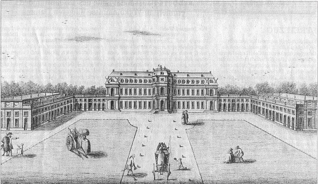 Schloss Herzogsfreude, Kupferstich von 1785